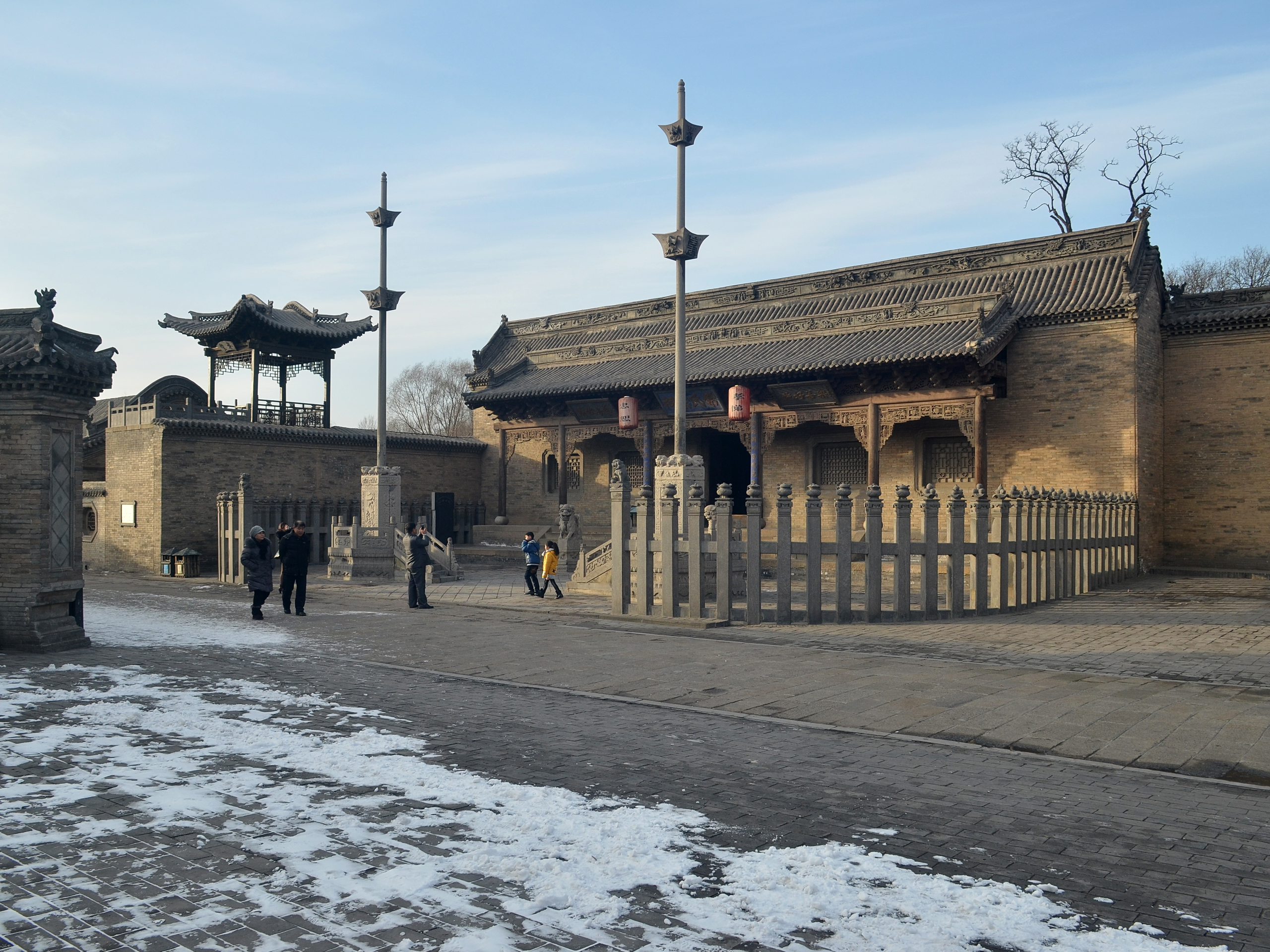 中文（中国大陆）: 常家庄园常氏宗祠又称家庙